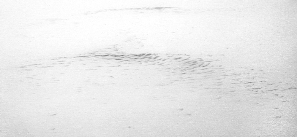 huile sur toile